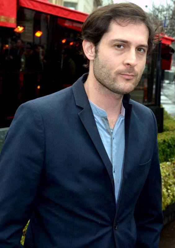 Arthur Harari au déjeuner des nommés des César du cinéma.